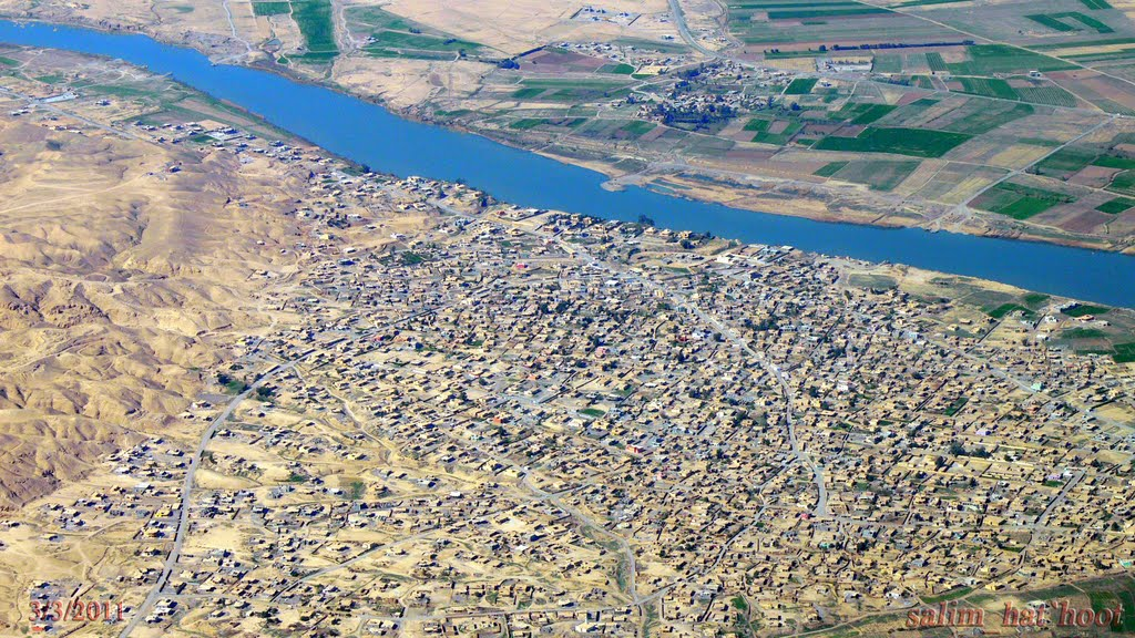 الزوية قبل غزوة داعش